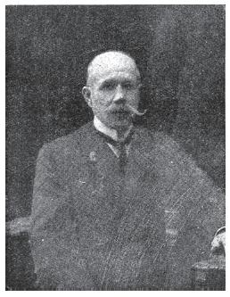 Иван Попов.